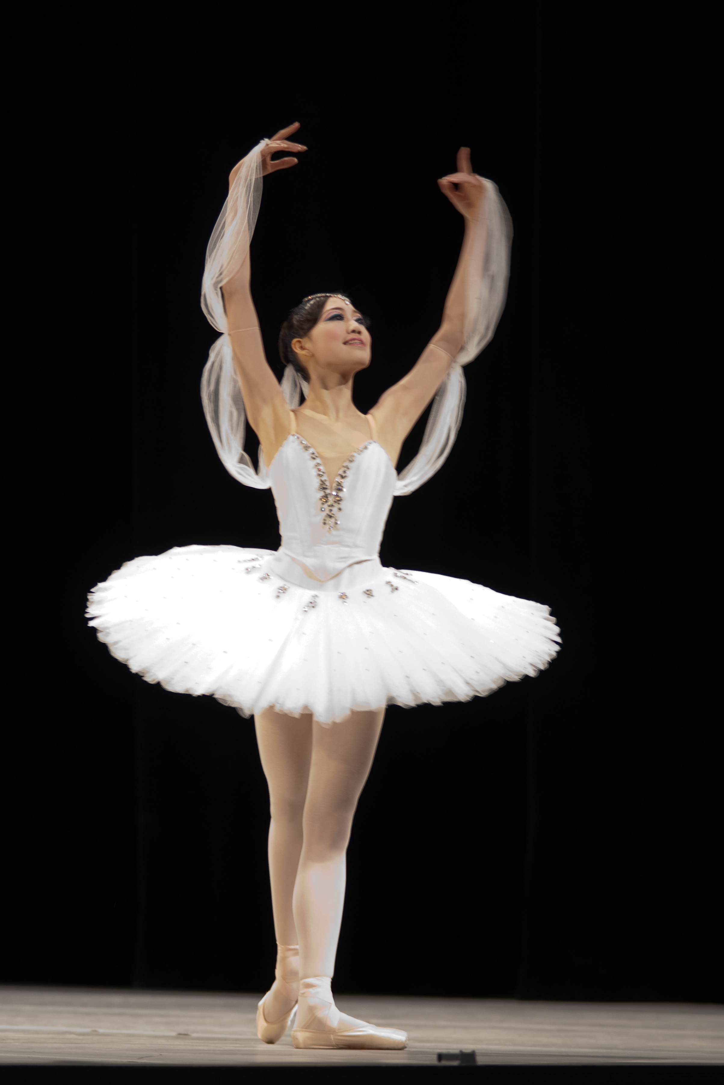 Variation extraite de La Bayadère au Prix de Lausanne 2010.